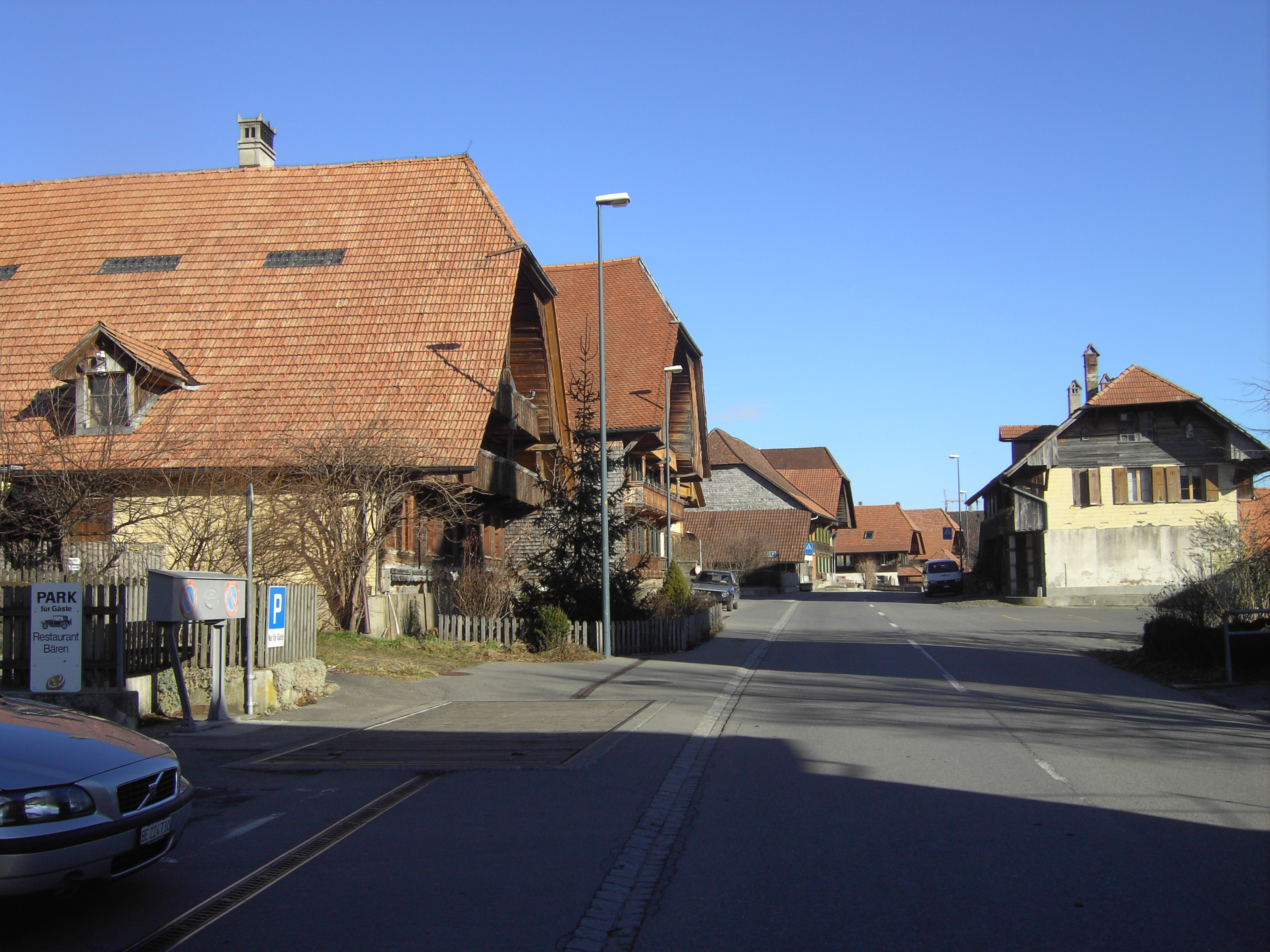 Rüeggisberg BE